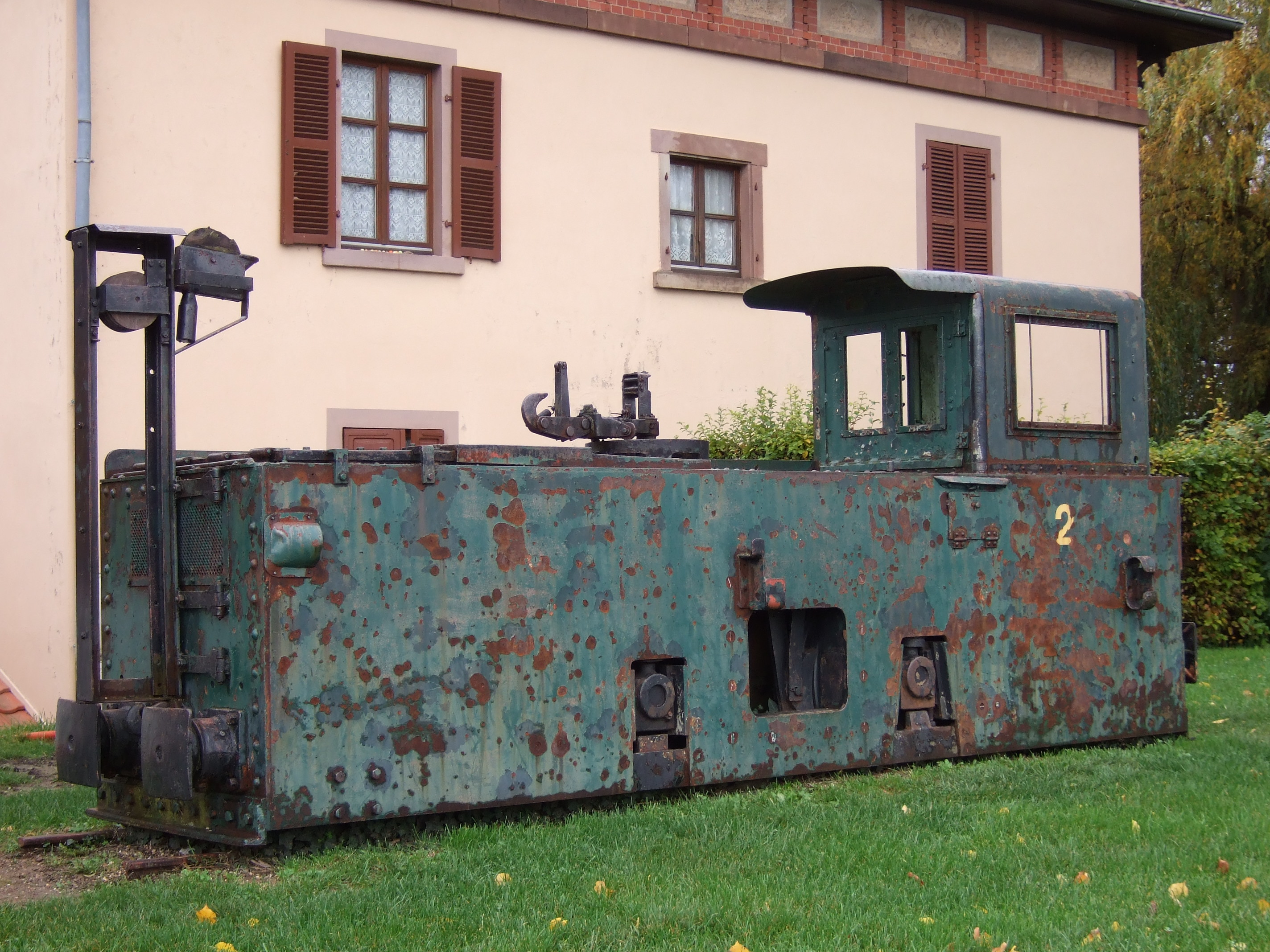 Treidellokomotive am Grand bassin in Saverne